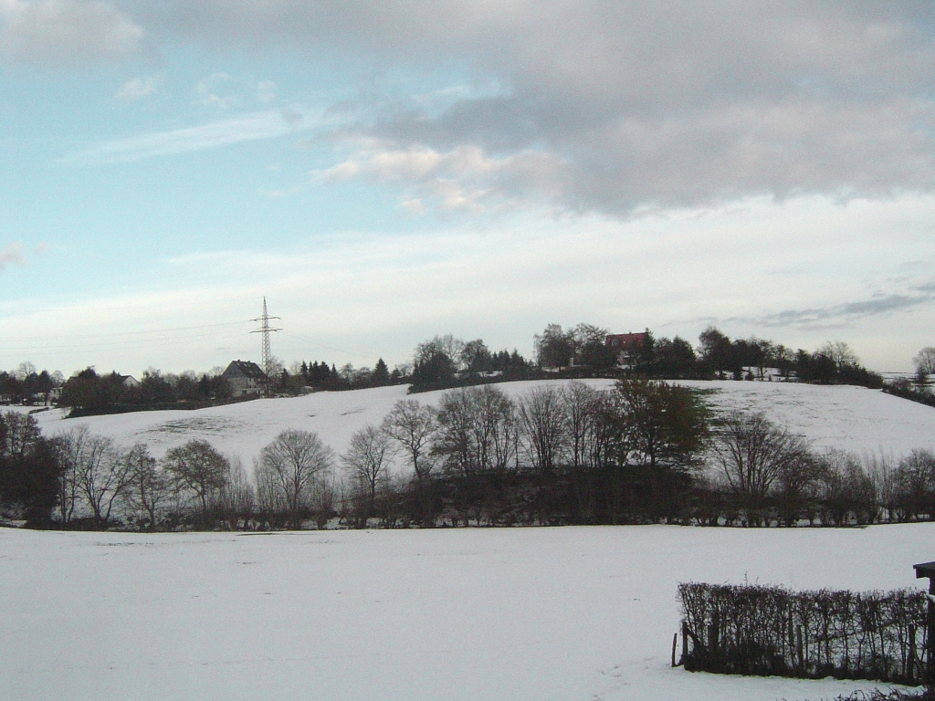 Blick auf den Nächstebrecker Berg (Wohnplatz Nächstebrecker Berg, Aufnahmestandort bei Mählersbeck 164) selbst fotografiert von Pitichinaccio, 03-12-2005